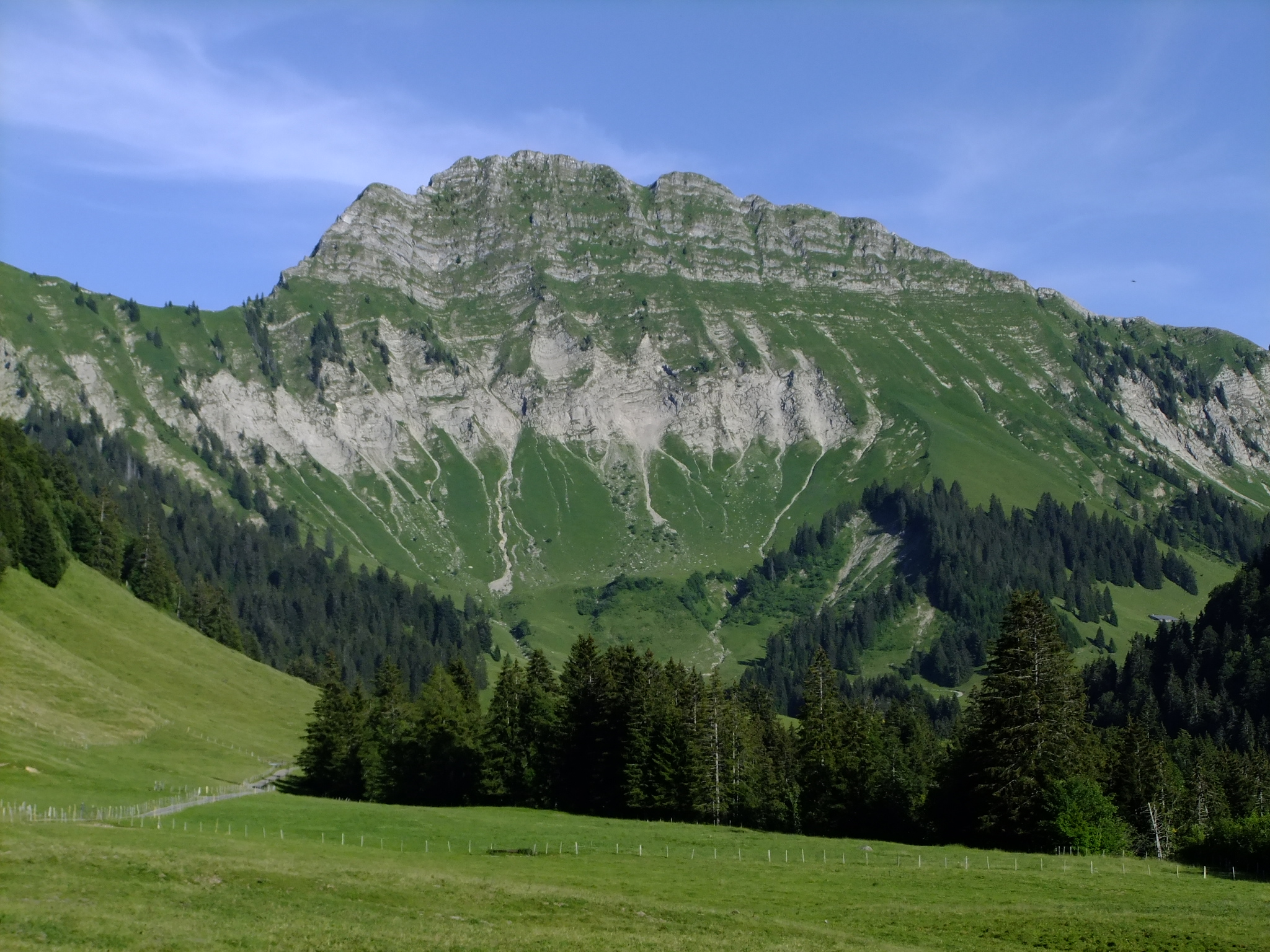 La face ouest du Vanil des Artses, photographiée depuis la route de Guedères aux Paccots, près de la grange des Preises